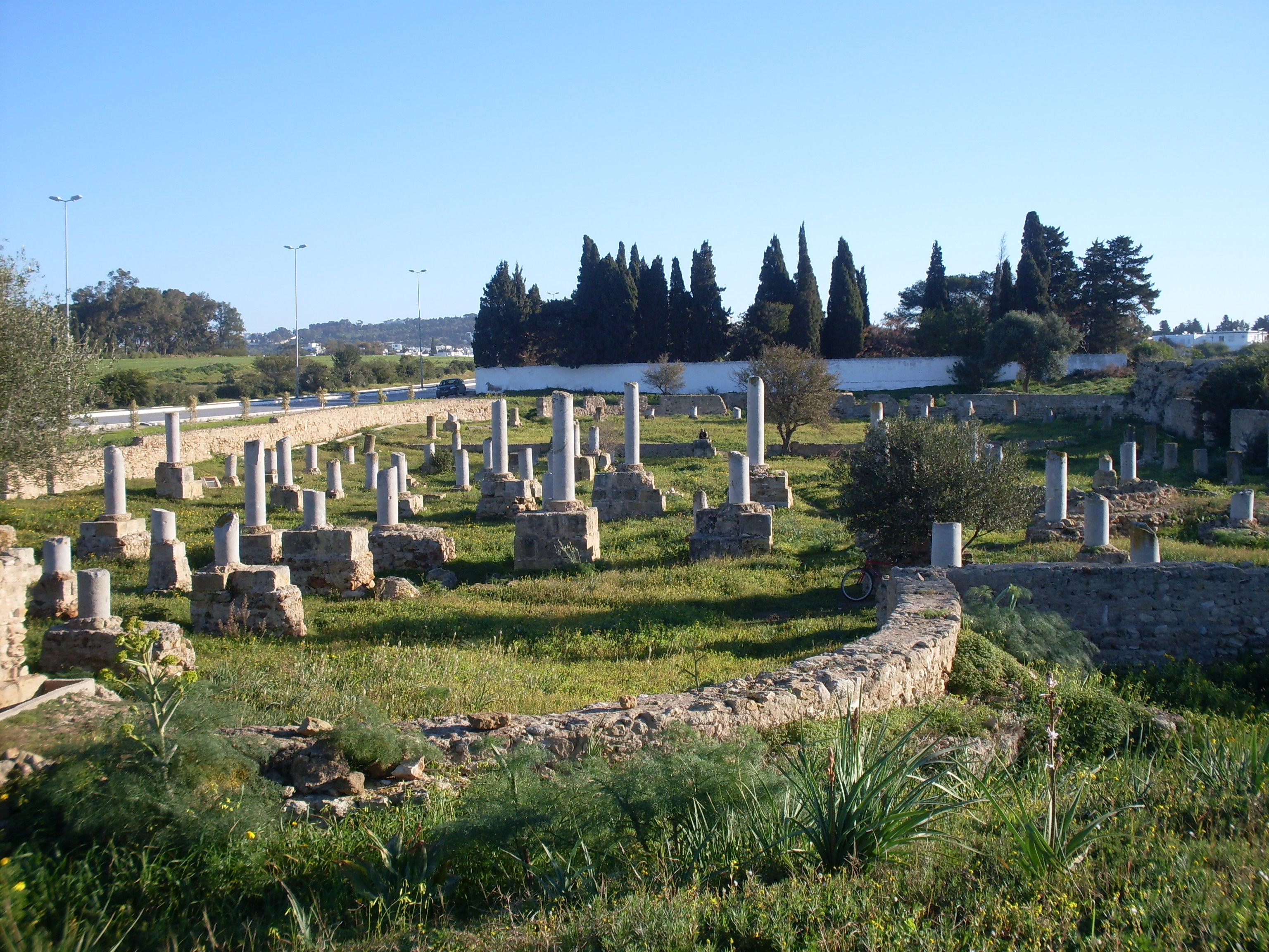 basilique de Damous el Karita